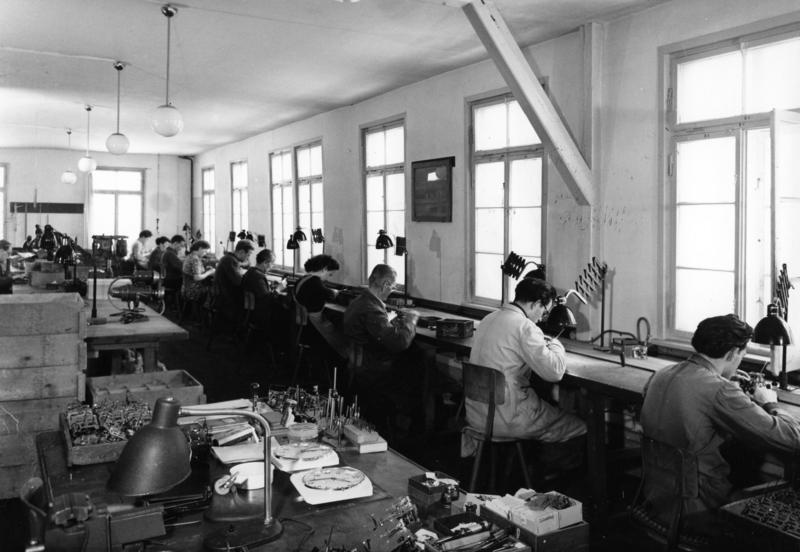 Februar 1954 Furtwangen/Schwarzwald Badische Uhrenfabrik